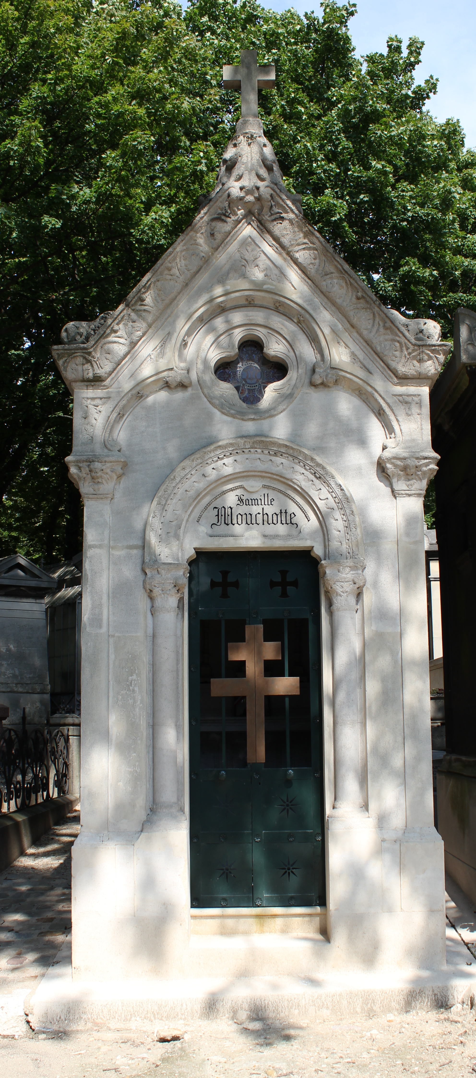 Chapelle